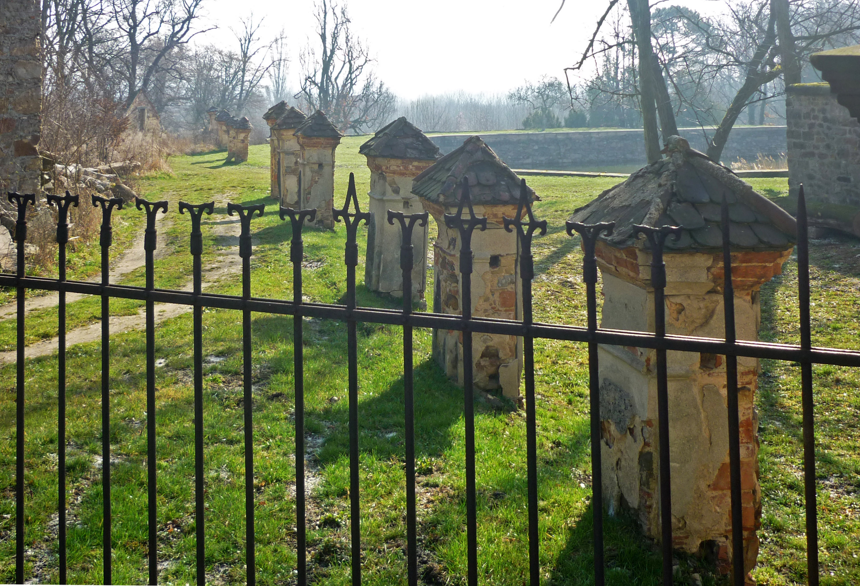 Kreuzweg in der ehem. Zisterzienserabtei Ossegg (Osek)